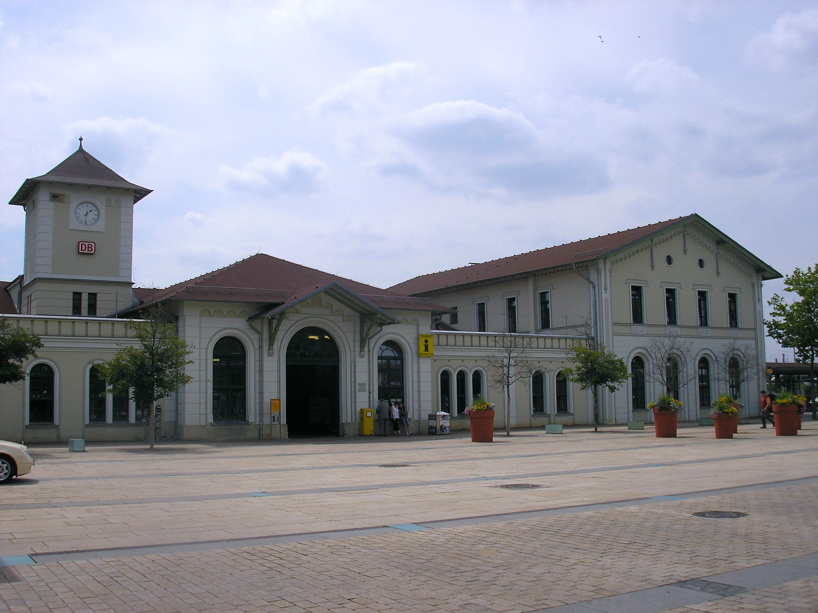 Der Bahnhof von Nordhausen (Thüringen).